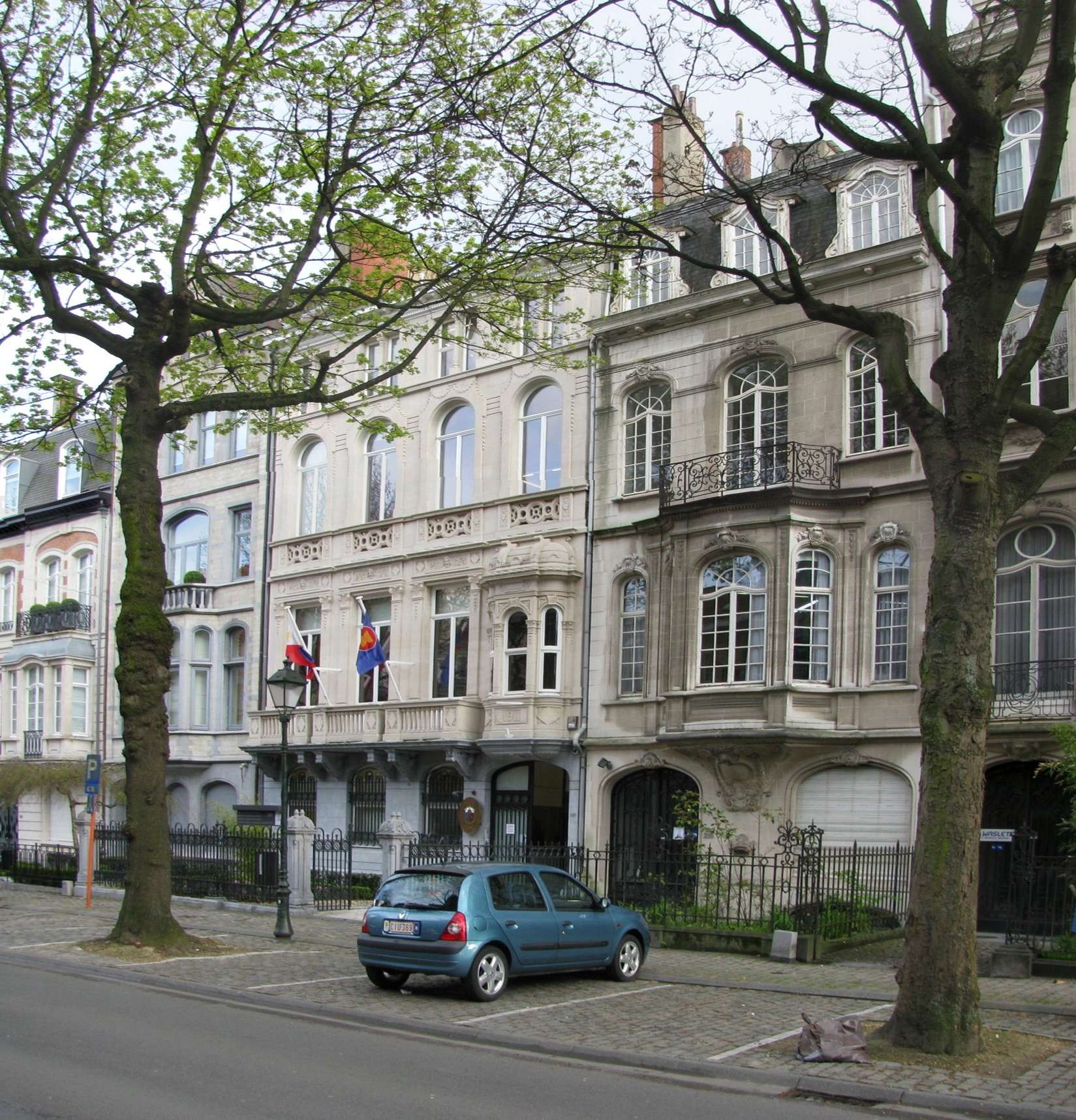 Ixelles, av.Molière Hôtels de Maître, le 297 par Fernand Symons en 1911 (Ambassade)